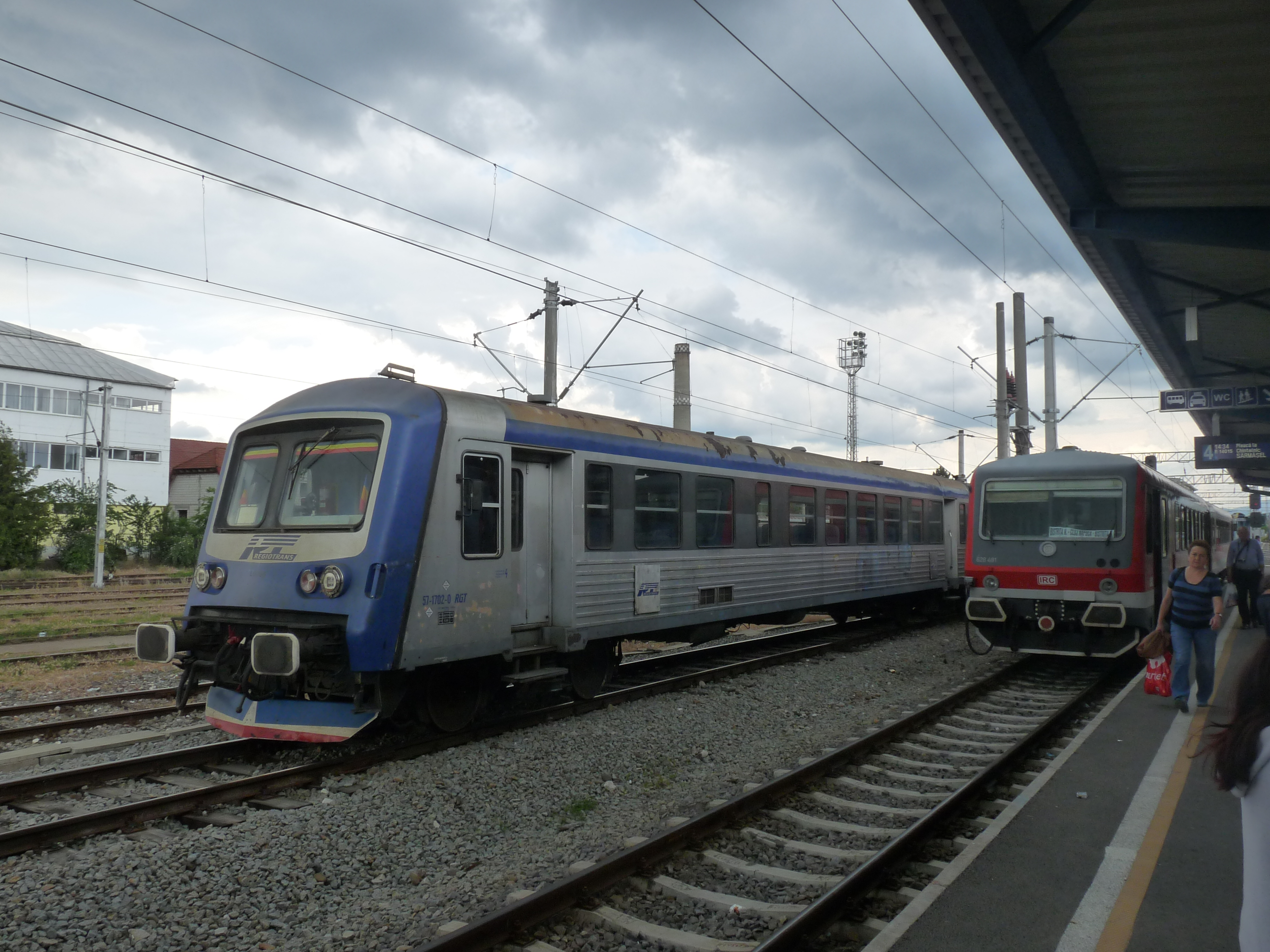 Bistrița Nord station